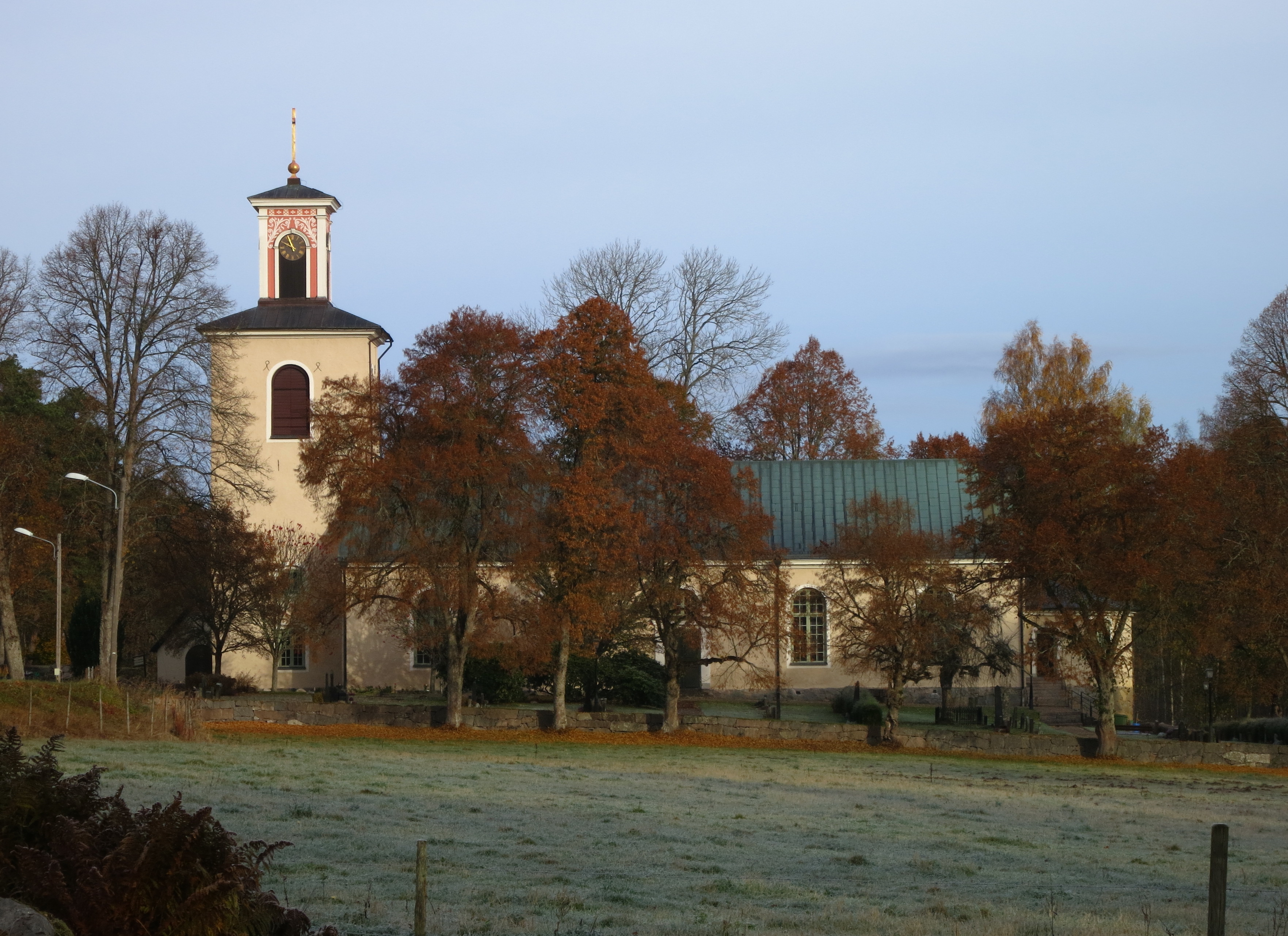 Ljuders kyrka i oktober 2013